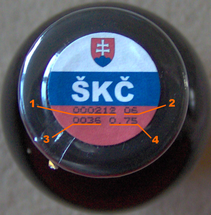 Etiketa štátneho kontrolného čísla.